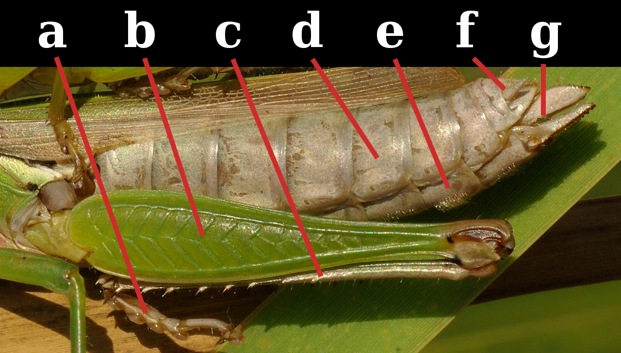 see legend below